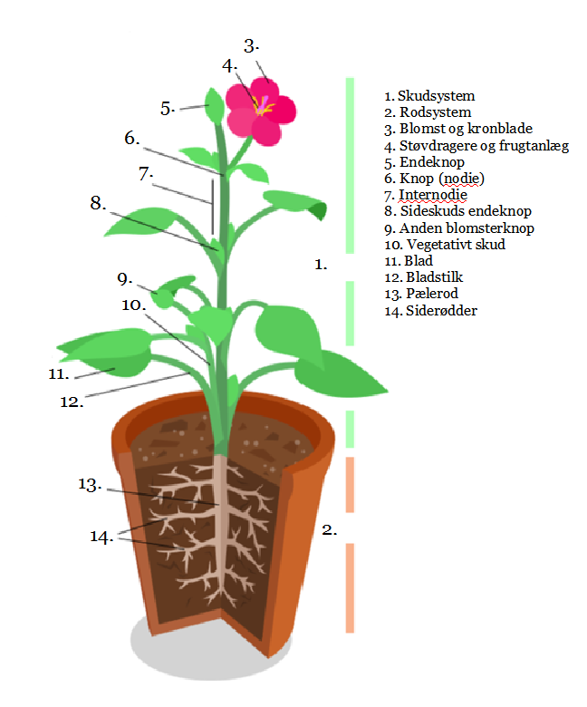 Illustration af de morfologisk vigtigste dele af en tokimbladet plante med danske tekster. 1. Skudsystem 2. Rodsystem 3. Blomst og kronblade 4. Støvdragere og frugtanlæg 5. Endeknop 6. Knop (nodie) 7. Internodie 8. Sideskuds endeknop 9. Anden blomsterknop 10. Vegetativt skud 11. Blad 12. Bladstilk 13. Pælerod 14. Siderødder